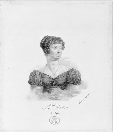 Sophie Cottin, née Risteau (1770-1807), écrivain